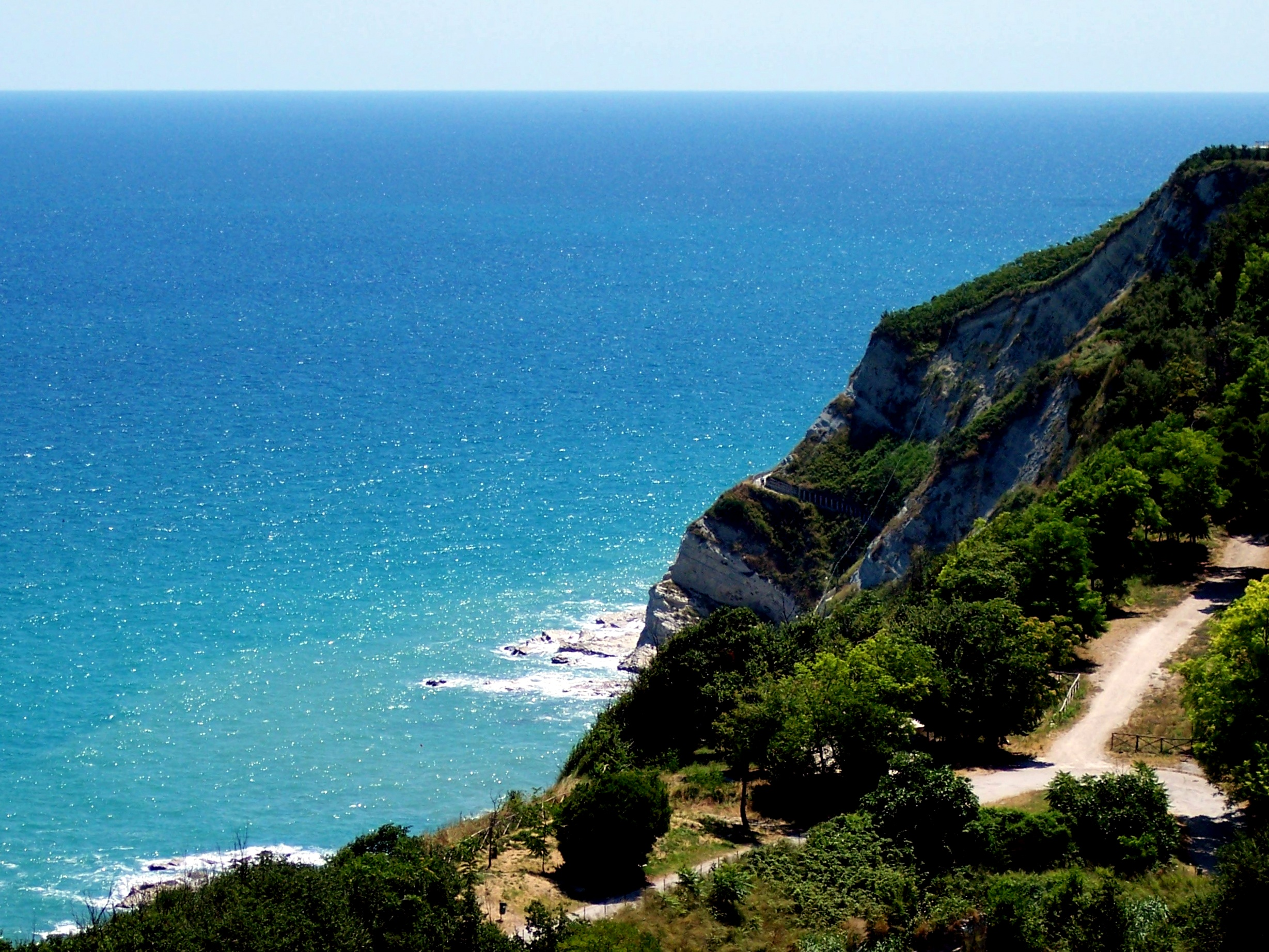 L'immagine è il risultato di una serie di modifiche di: File:ParcoCardeto2.JPG, presente su Commons. Le modifiche sono: miglioramento del contrasto, raddrizzamento dell'orizzonte, ritaglio dei margini.